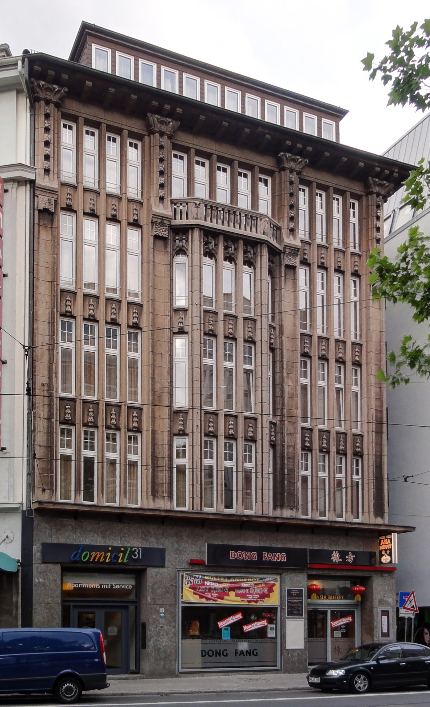 Bahnhofstraße 6, ehemaliges Bürogebäude der DEHOMAG Deutsche Hollerithgesellschaft (Bremer Vertretung)